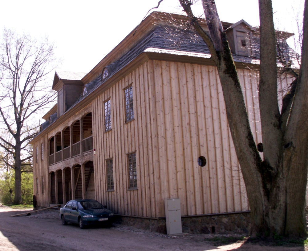 Kurtuvėnai – miestelis Šiaulių rajono pietvakariuose